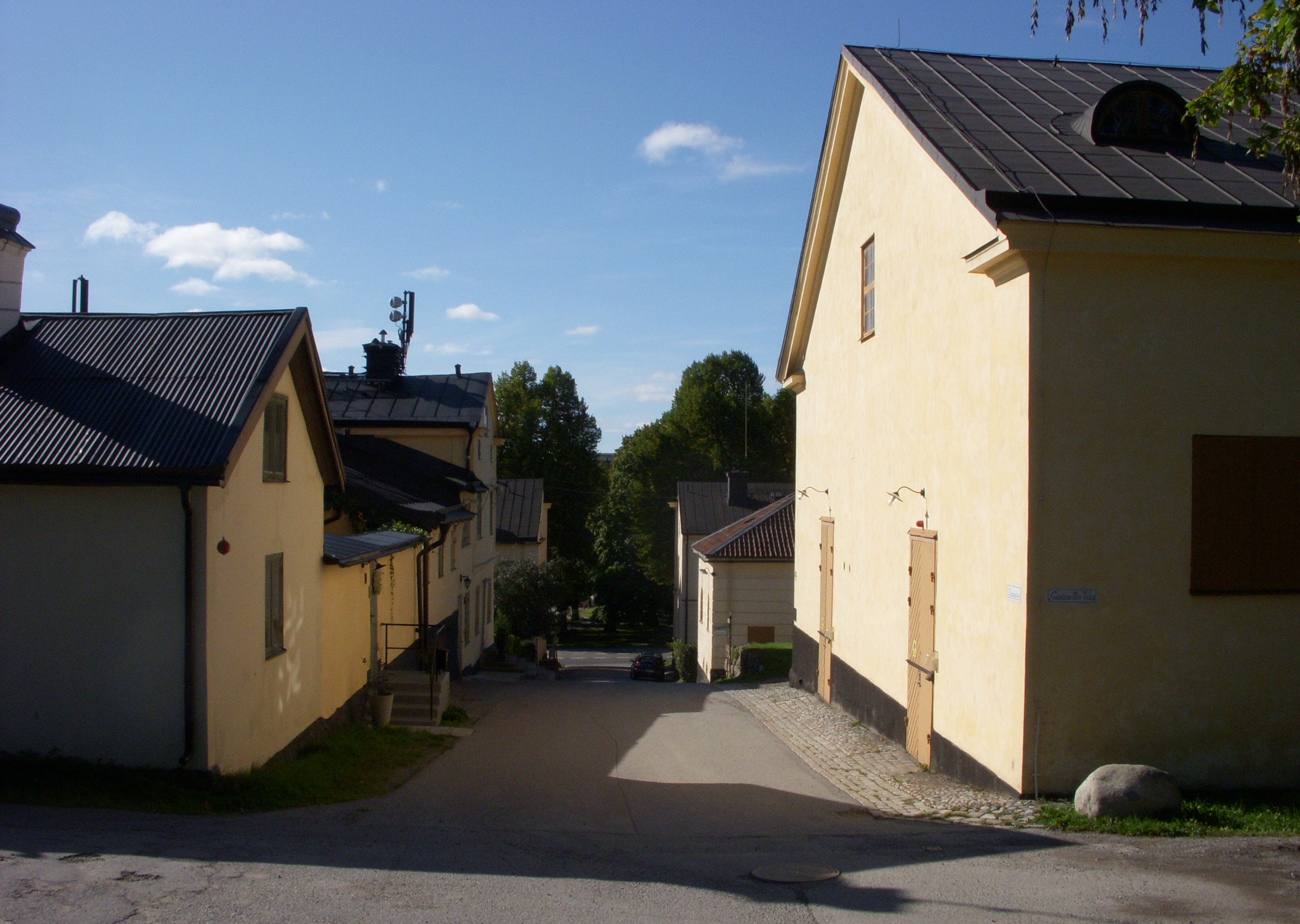 Malmbacken mot syd på Drottningholmsmalmen